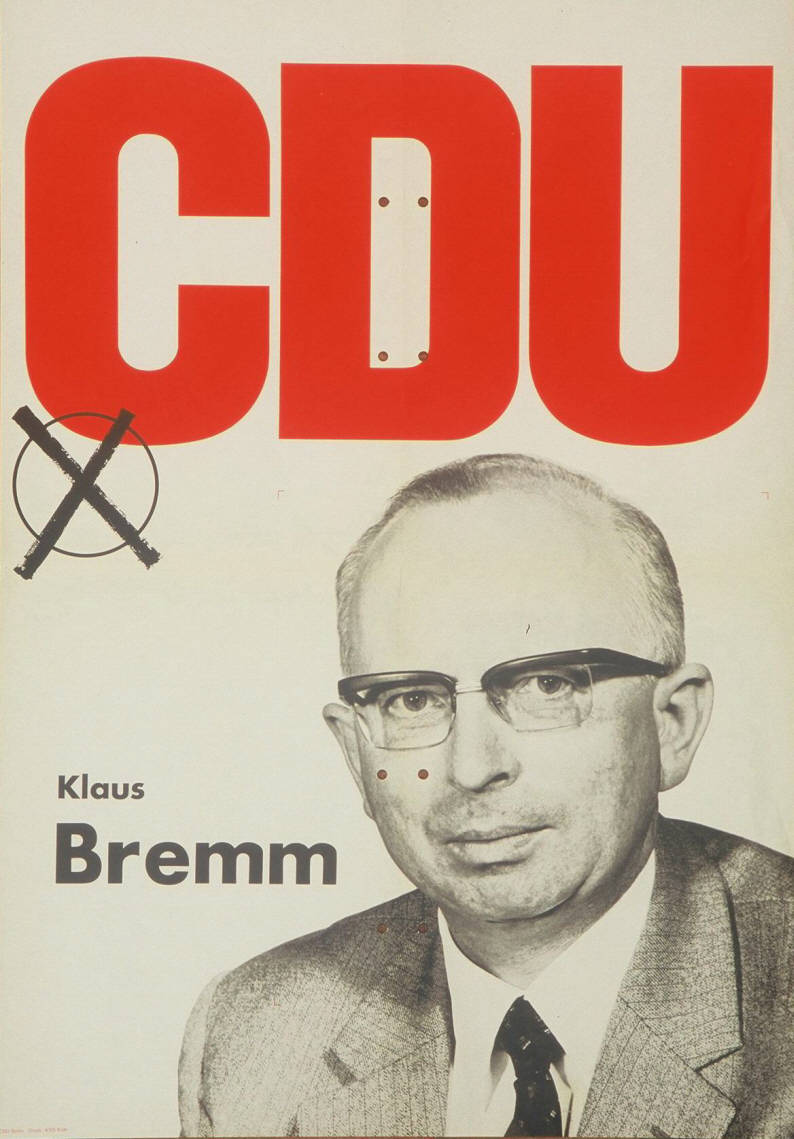 CDU Klaus Bremm Abbildung: Porträtfoto - Stimmkreuz Plakatart: Kandidaten-/Personenplakat mit Porträt Auftraggeber: CDU Bonn Drucker_Druckart_Druckort: KVD Köln Objekt-Signatur: 10-001 : 1452 Bestand: Plakate zu Bundestagswahlen (10-001) GliederungBestand10-18: Plakate zu Bundestagswahlen (10-001) » Die 6. Bundestagswahl am 28. September 1969 » CDU » Mit Porträtfoto Lizenz: KAS/ACDP 10-001 : 1452 CC-BY-SA 3.0 DE